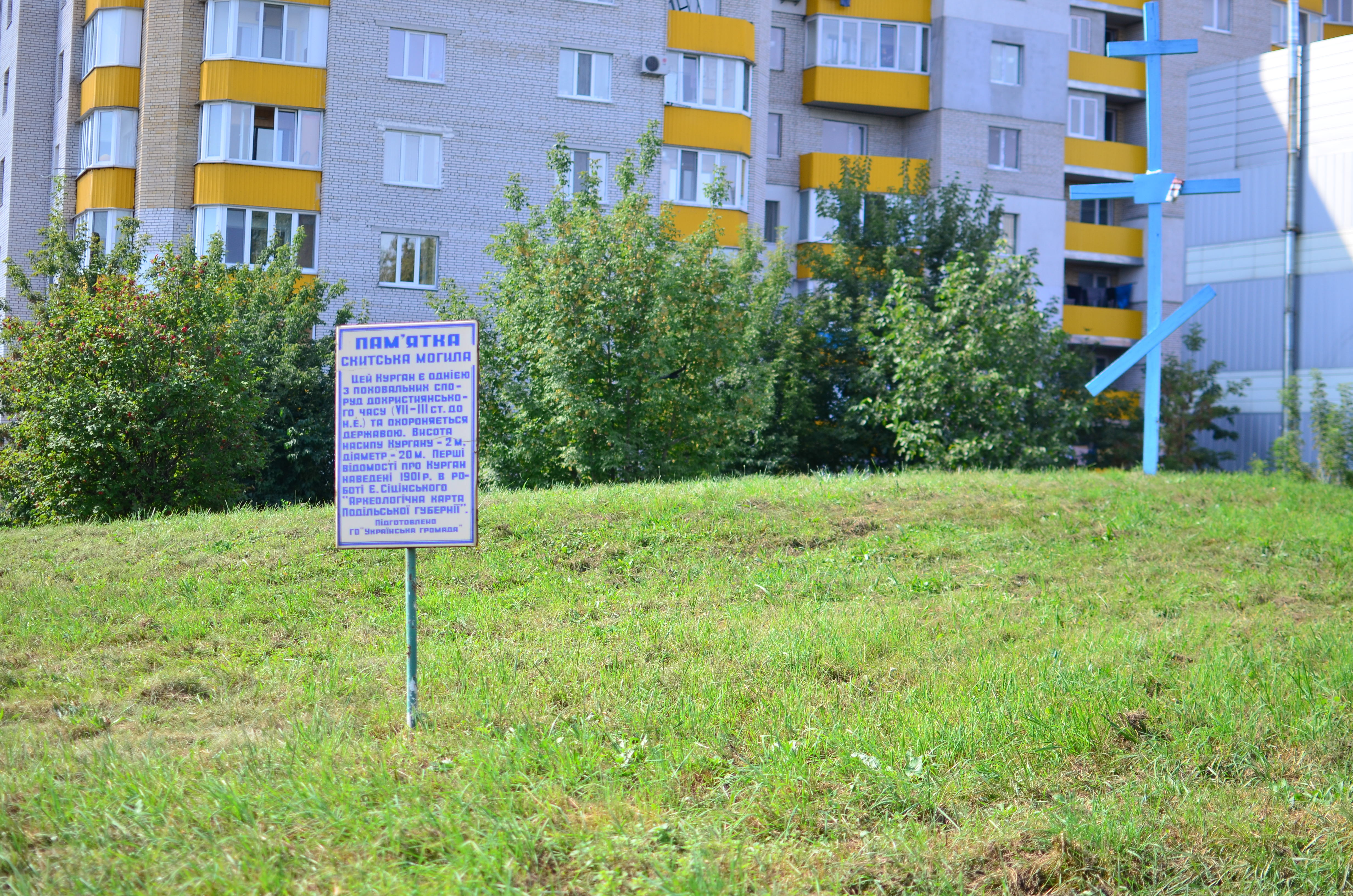 Хмельницький, Проспект Миру 102. Курган "Скитська могила".